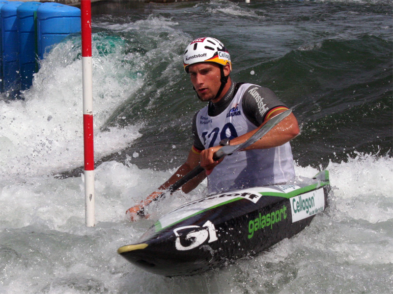 Deutscher Kanu-Slalom Fahrer und Olympiasieger 2008